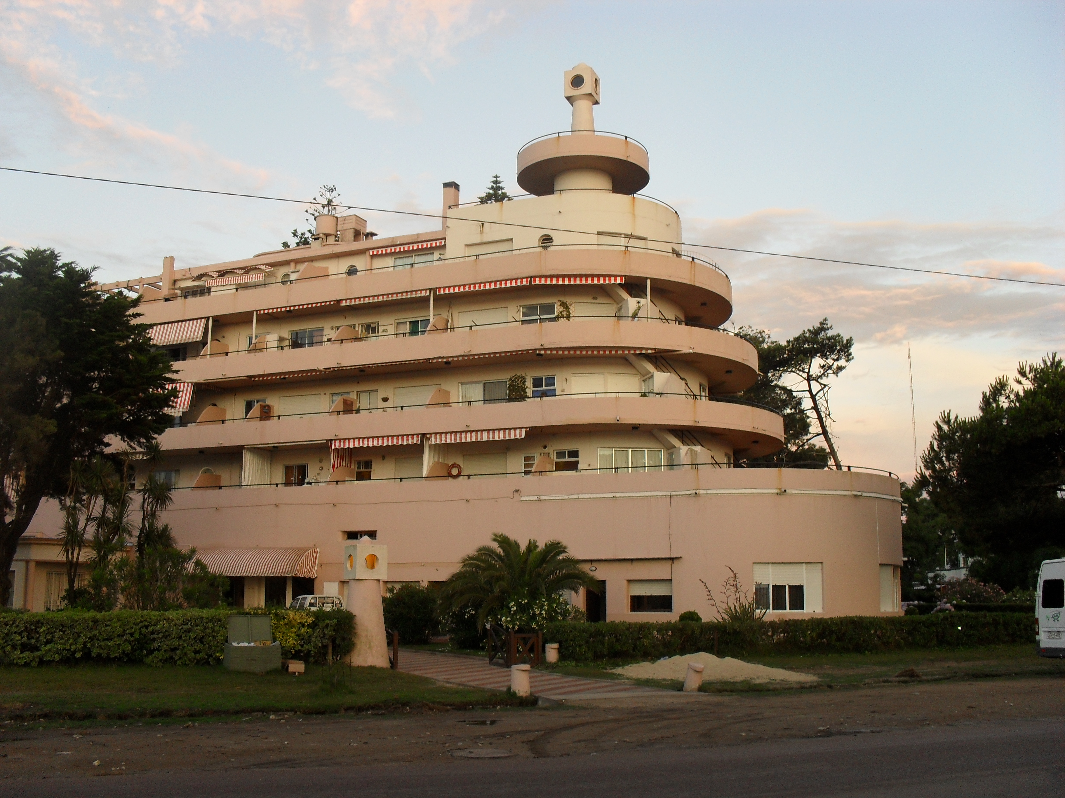 Edificio perteneciente al ex-hotel Planeta Palace. Hoy en día, actúa como un edificio de apartamentos. Fue declarado Monumento Histórico Nacional. Se ubica en la Rambla Mansa de Atlántida, Municipio de Atlántida, Departamento de Canelones, Uruguay.